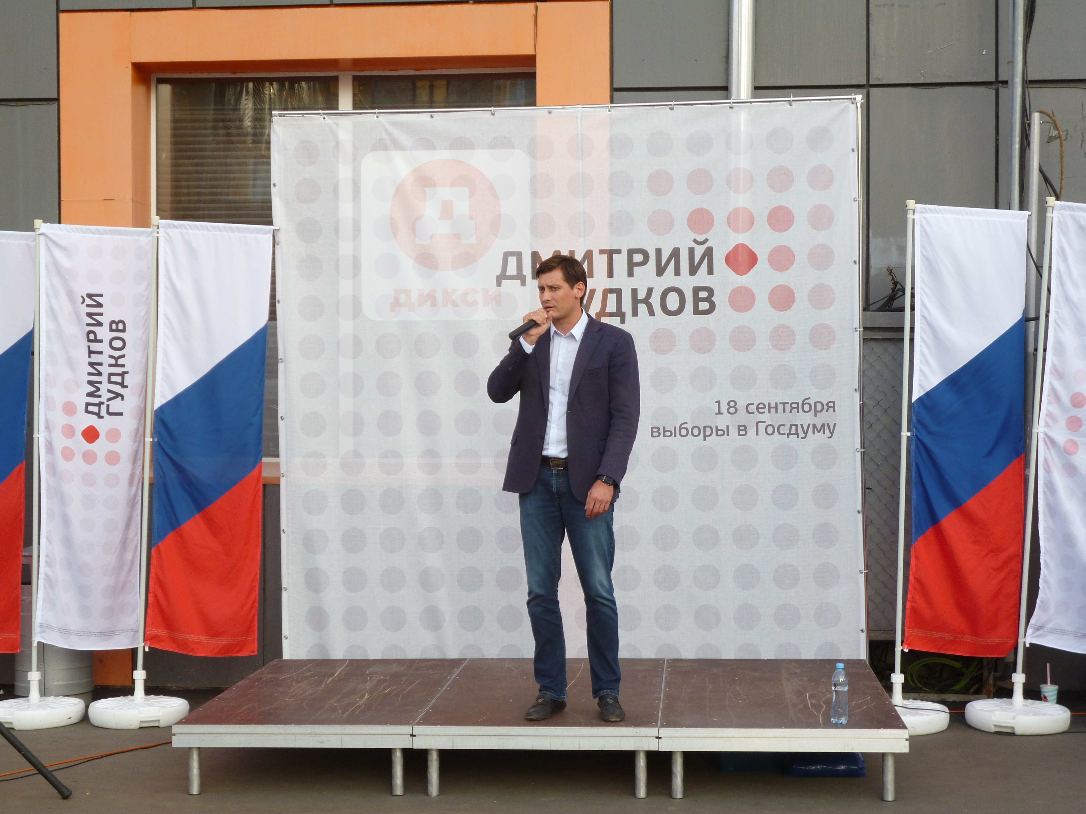 Выступление Дмитрия Гудкова у метро "Октябрьское поле".